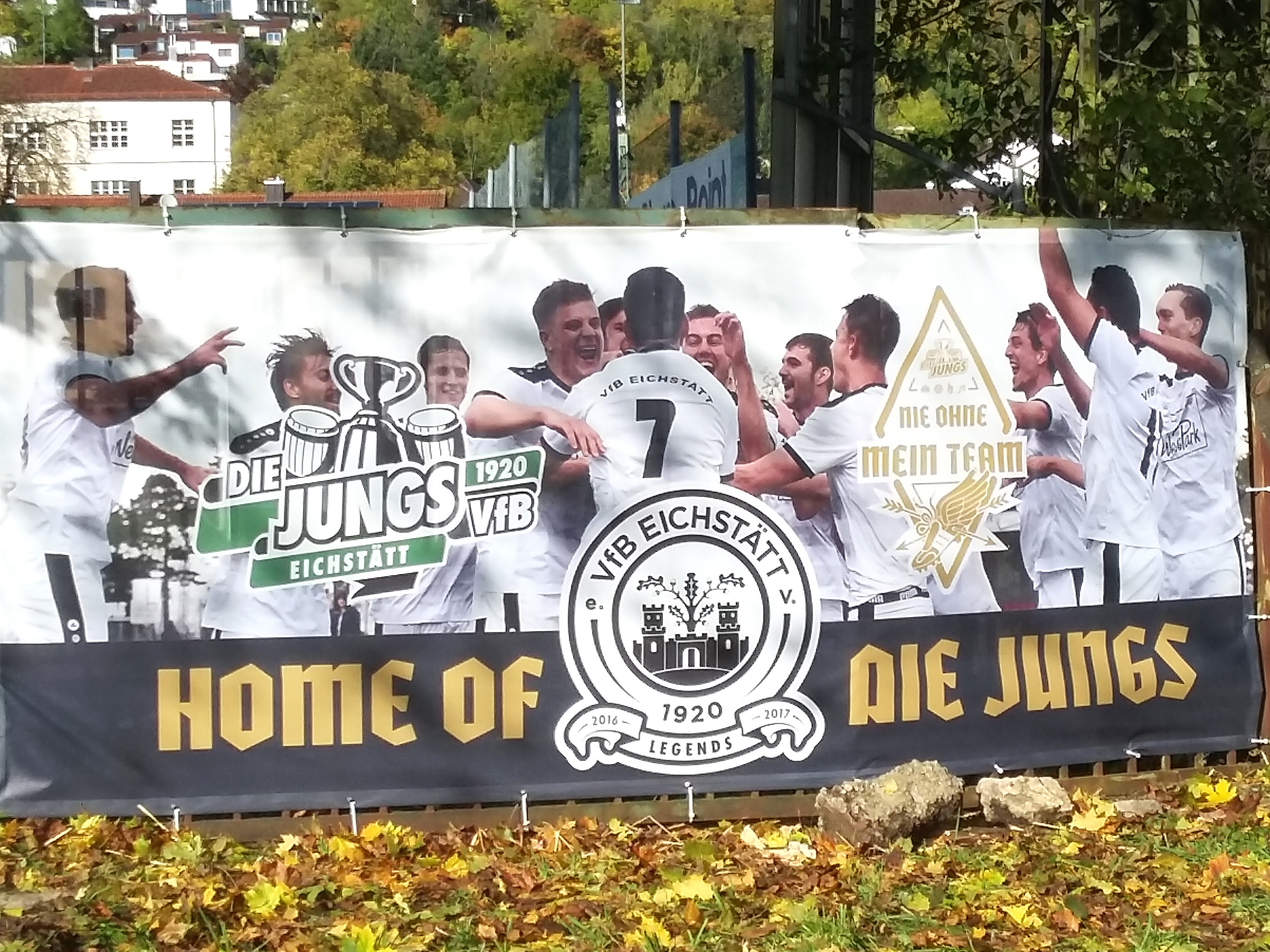 Banner am Liqui-Moly-Stadion in Eichstätt